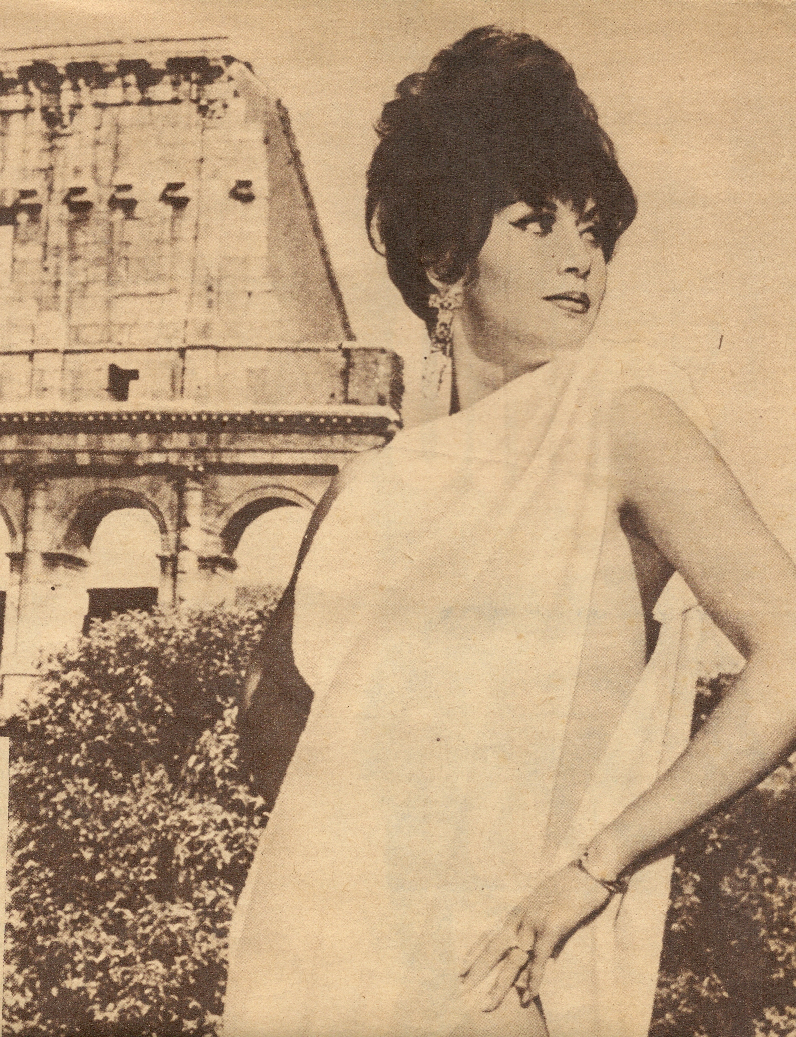 Ana Bertha Lepe, Roma, Italia, 1966.